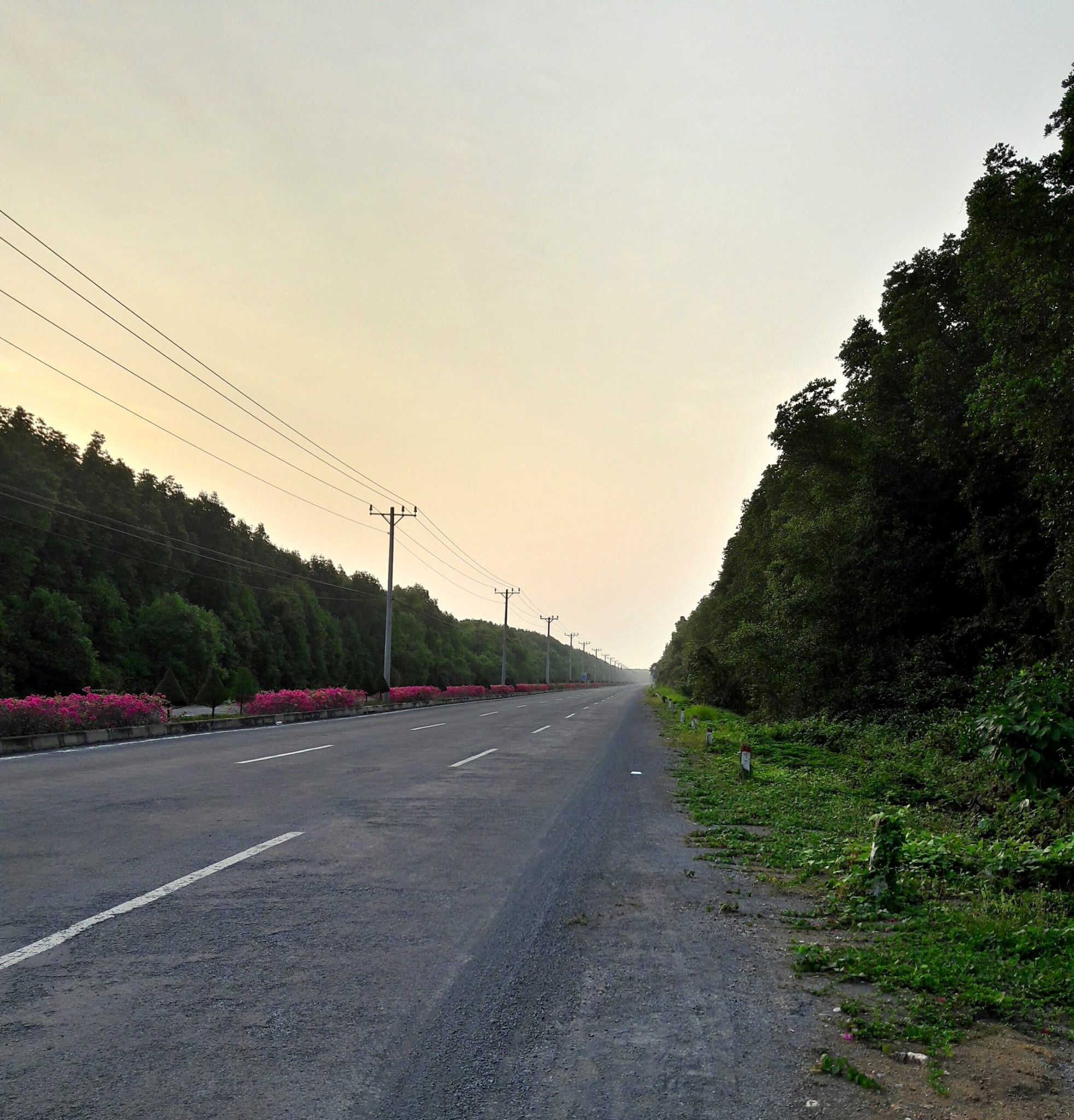 Một đoạn đường Rừng Sác, huyện Cần Giờ